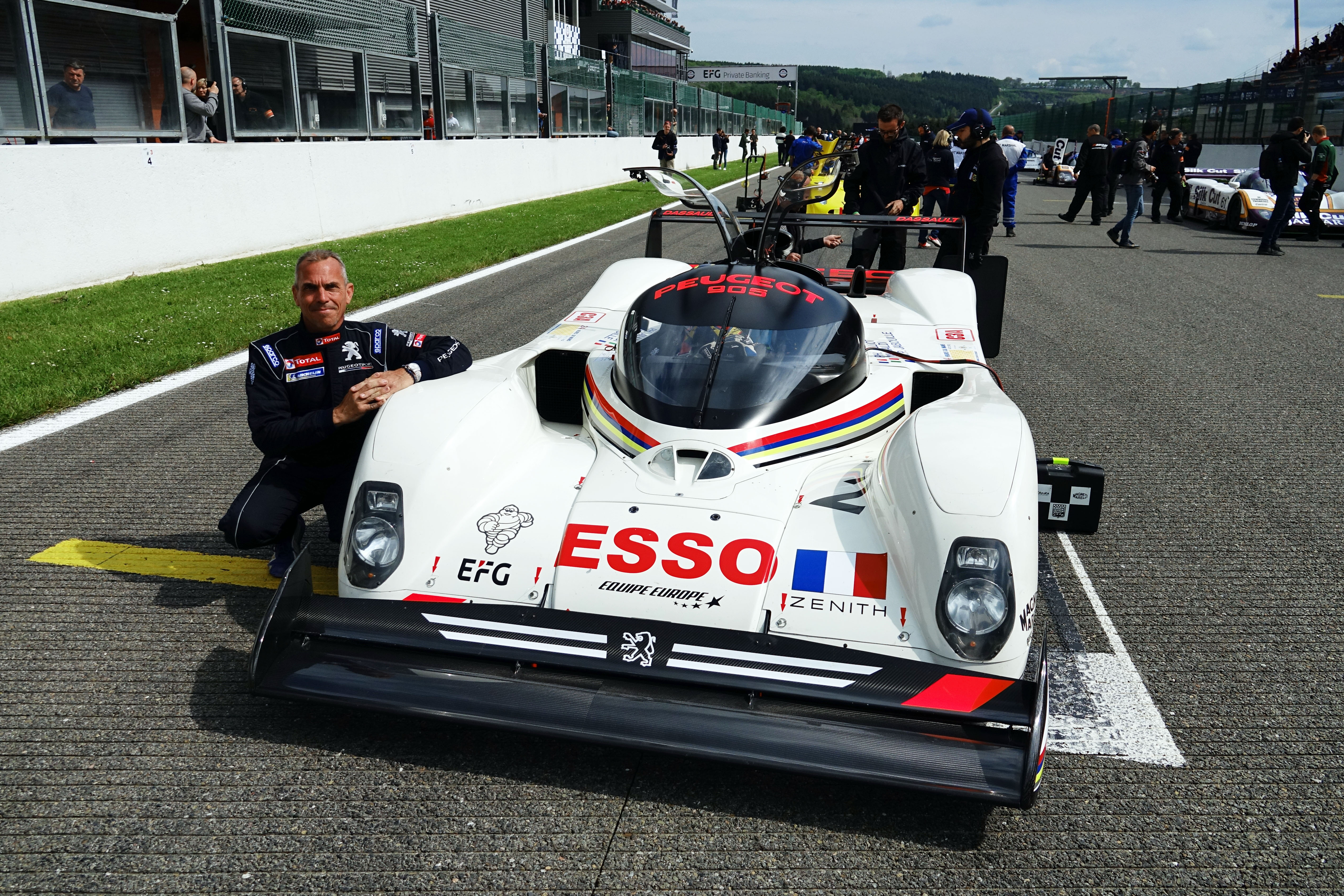 Spa Classic - Peugeot 905 Evo 1B - Éric Hélary